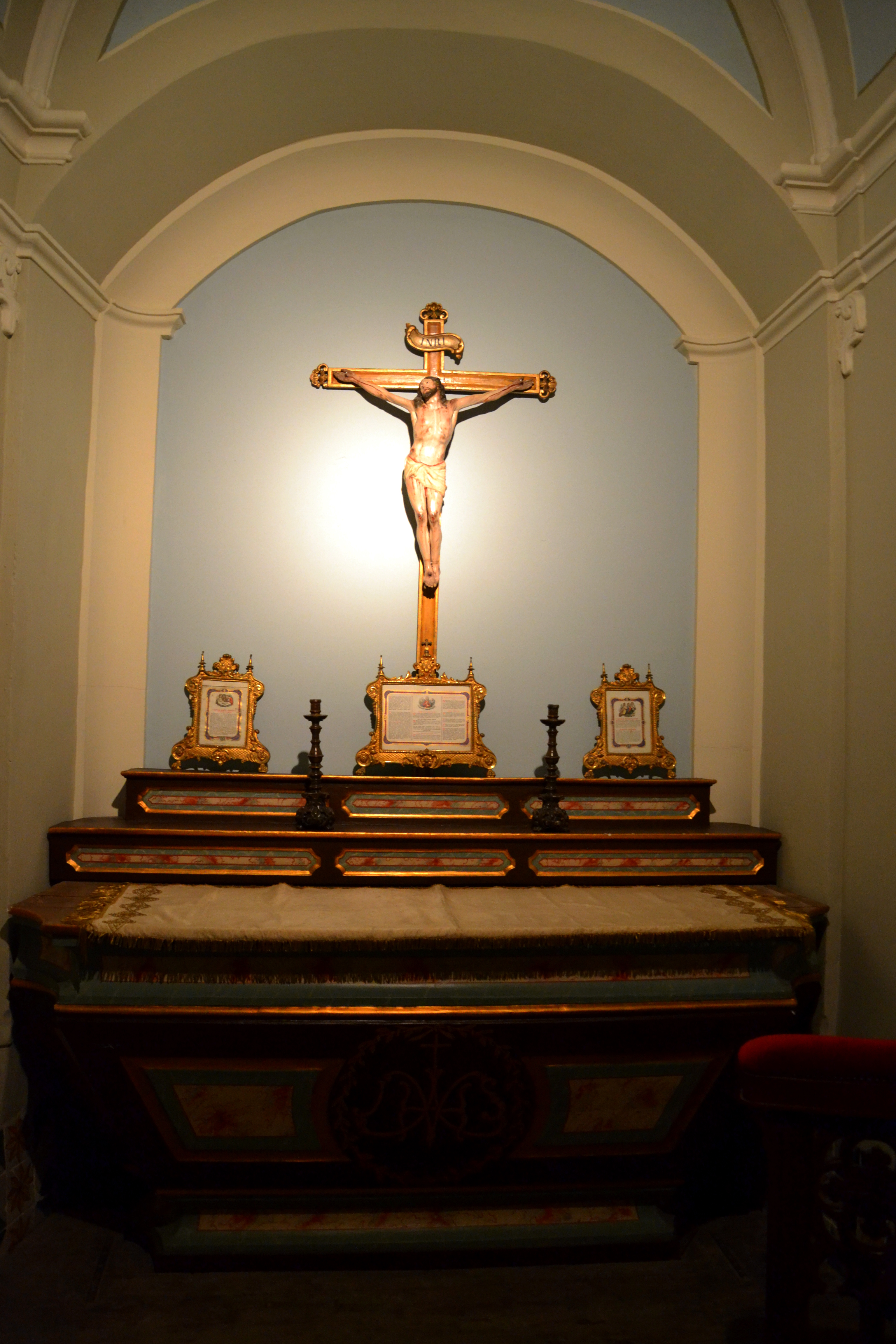 Casa natal de Rafael de Casanova, Moià. - 14317033226